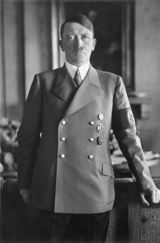 Adolf Hitler Zentralbild Adolf Hitler geb.: 20.4.1889 in Braunau am Inn, gest.: Selbstmord 30.4.1945 in Berlin; Vorsitzender der NSDAP; ab 30.1.1933 Reichskanzler, ab 12.8.1934 Führer und Reichskanzler; seit dem 4.2.1938 Oberbefehlshaber der Wehrmacht und ab 19.12.1941 Oberbefehlshaber des Heeres. Er ist hauptverantwortlich für die Ermordung von Millionen Menschen, bereitete den II. Weltkrieg vor und löste ihn aus. Der Verantwortung entzog er sich durch Selbstmord. U.Bz.: eine Aufnahme von 1938 2757-49 [Adolf Hitler (mit Eisernem Kreuz und Verwundeten-Abzeichen) an Schreibtisch stehend (Porträt)] Abgebildete Personen: Hitler, Adolf: Reichskanzler, Deutschland